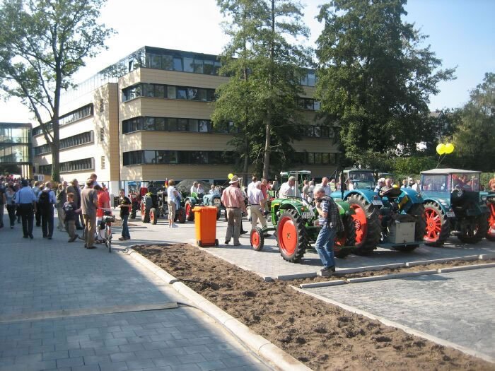 Neues Redaktionsgebäude von top agrar beim Landwirtschaftsverlag in Münster-Hiltrup. Das Foto entstand bei der Oldtimer-Sternfahrt 2007 zum Landwirtschaftsverlag Münster.